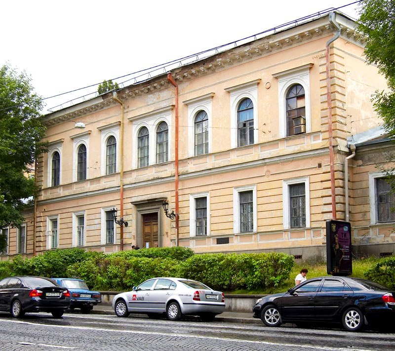 Будівля Національного музею медицини України, Київ, вул. Б.Хмельницького